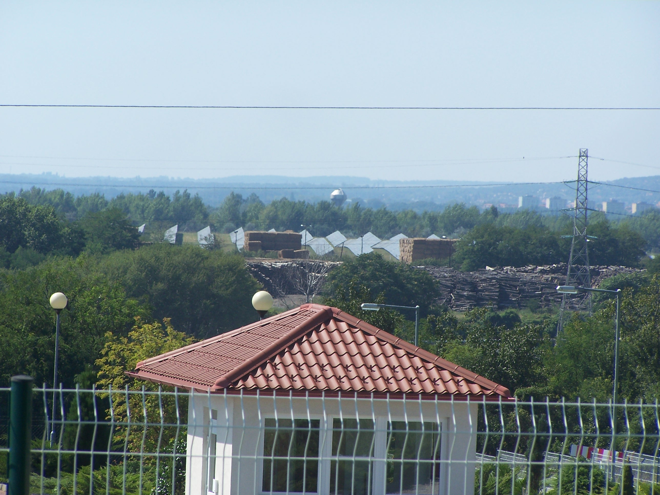 A pécsi naperőmű kelet felől